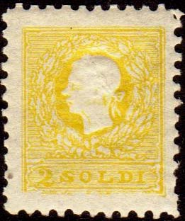 Первая почтовая марка Ломбардо-Венецианского королевства с номиналом в сольди